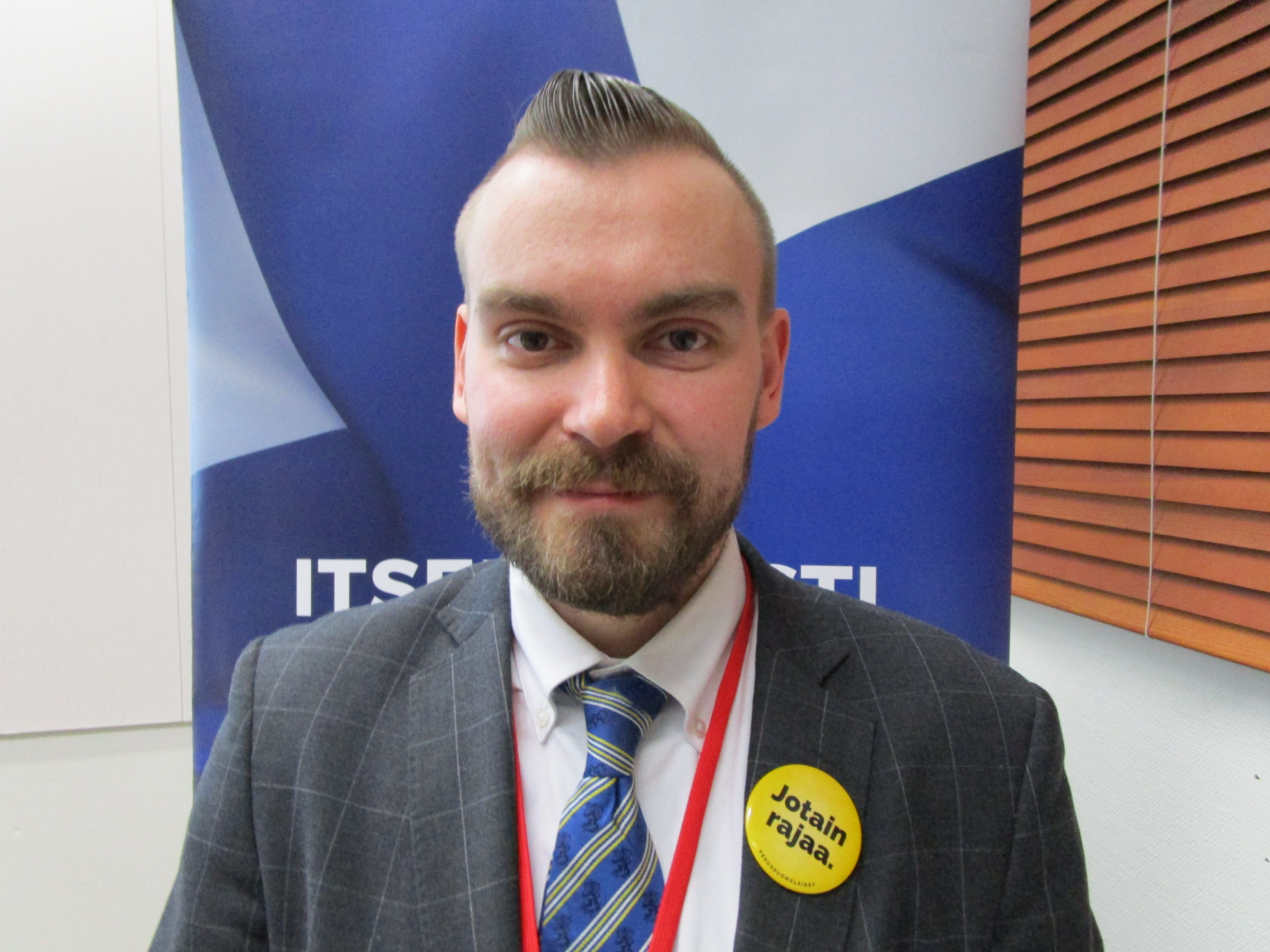 Samuli Voutila Kuopiossa 17.11.2018.